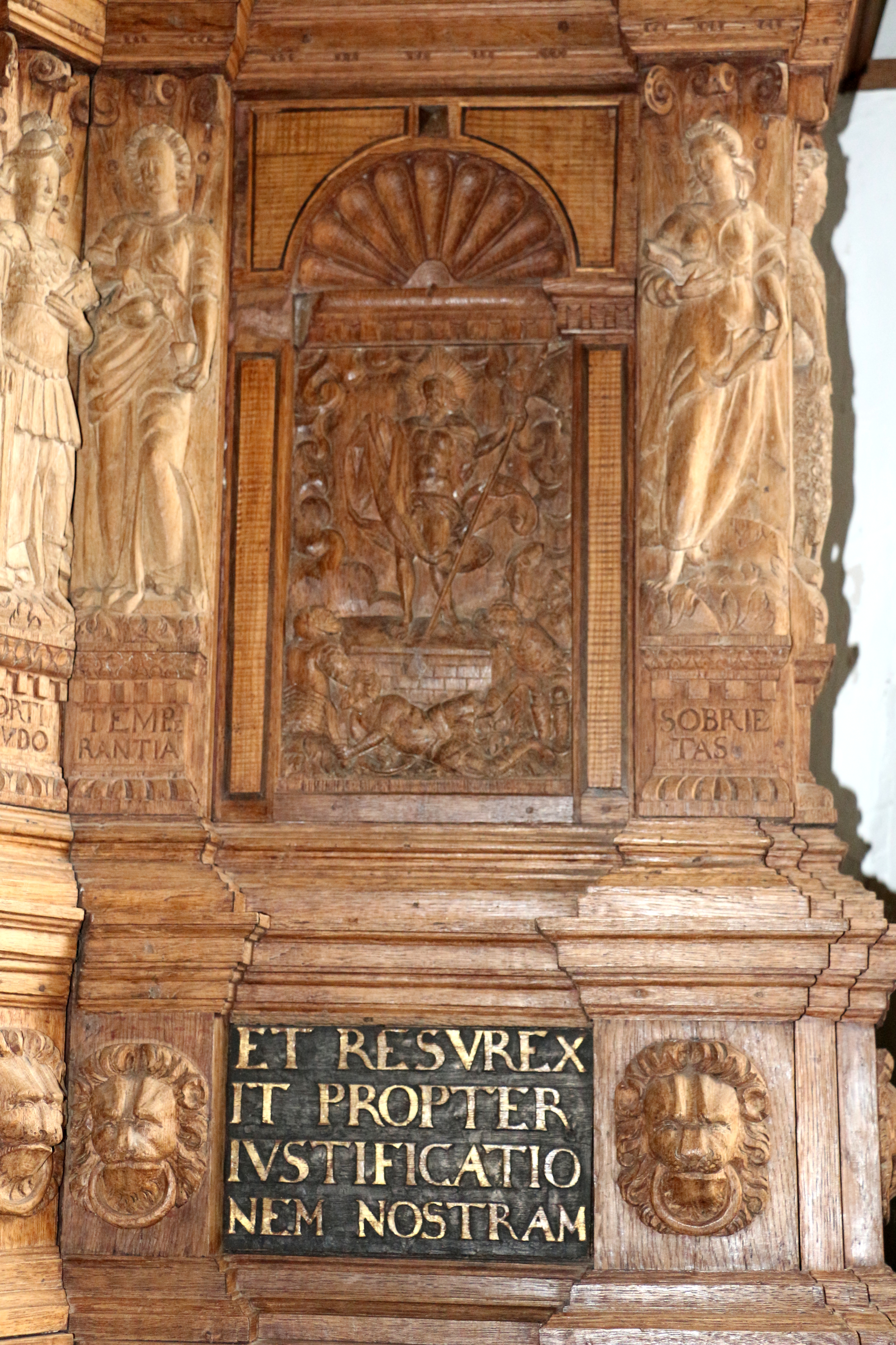 Darstellung der Auferstehung Christi auf der Kanzel der Kirche in Oeversee, vermutlich aus der Werkstatt von Heinrich Ringerink.